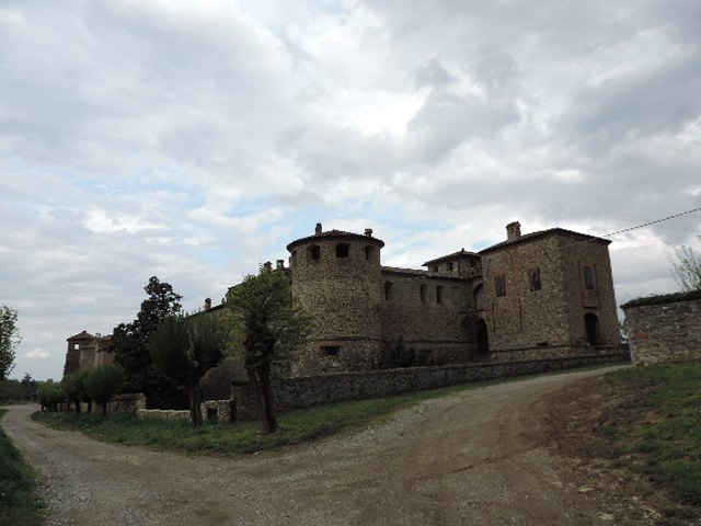 Rocca e Castello di Agazzano - MIBAC This is a photo of a monument which is part of cultural heritage of Italy.